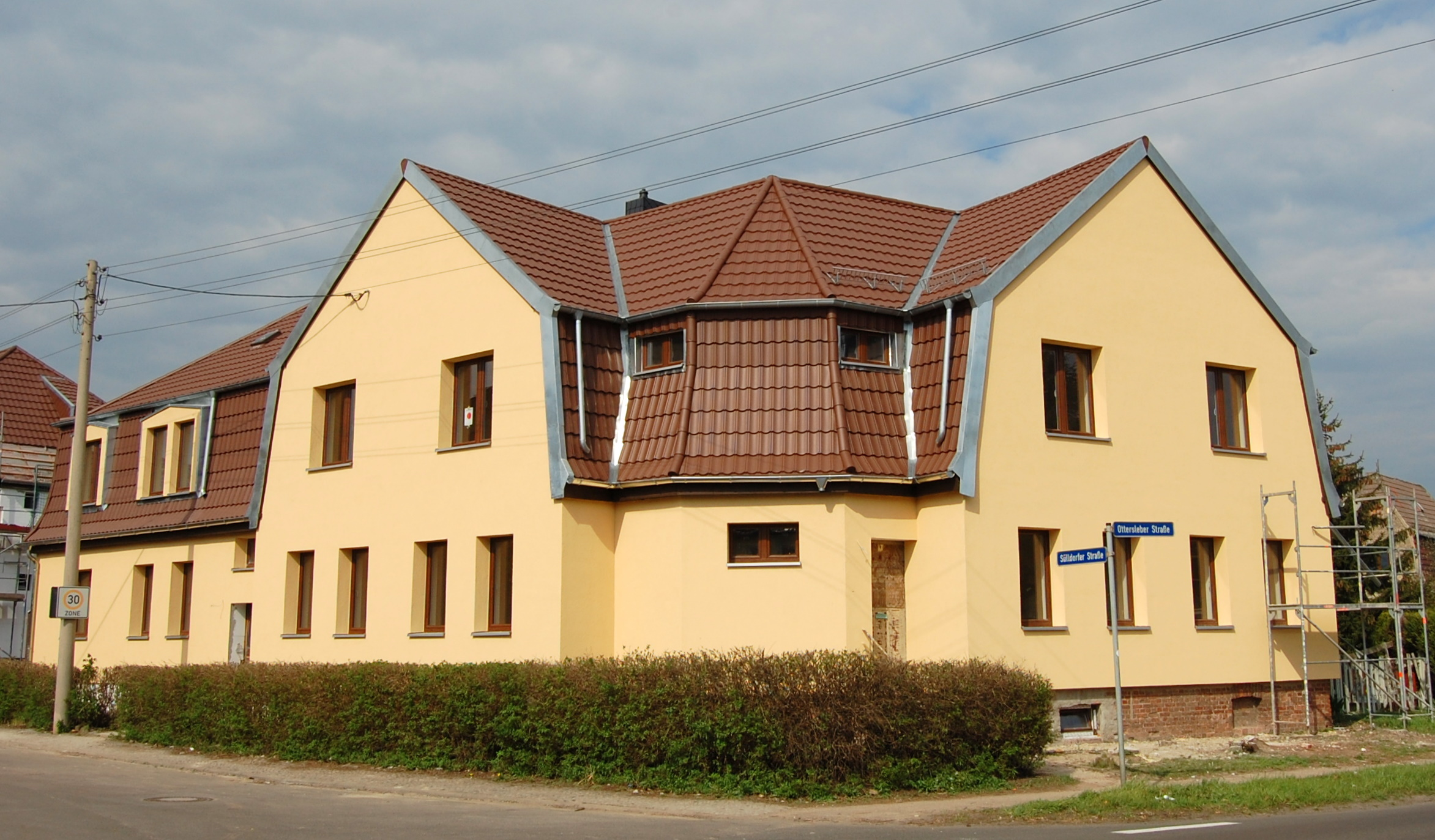 Wolfsfelde, Otersleber Str. /Ecke Sülldorfer Straße, saniertes Eckhaus